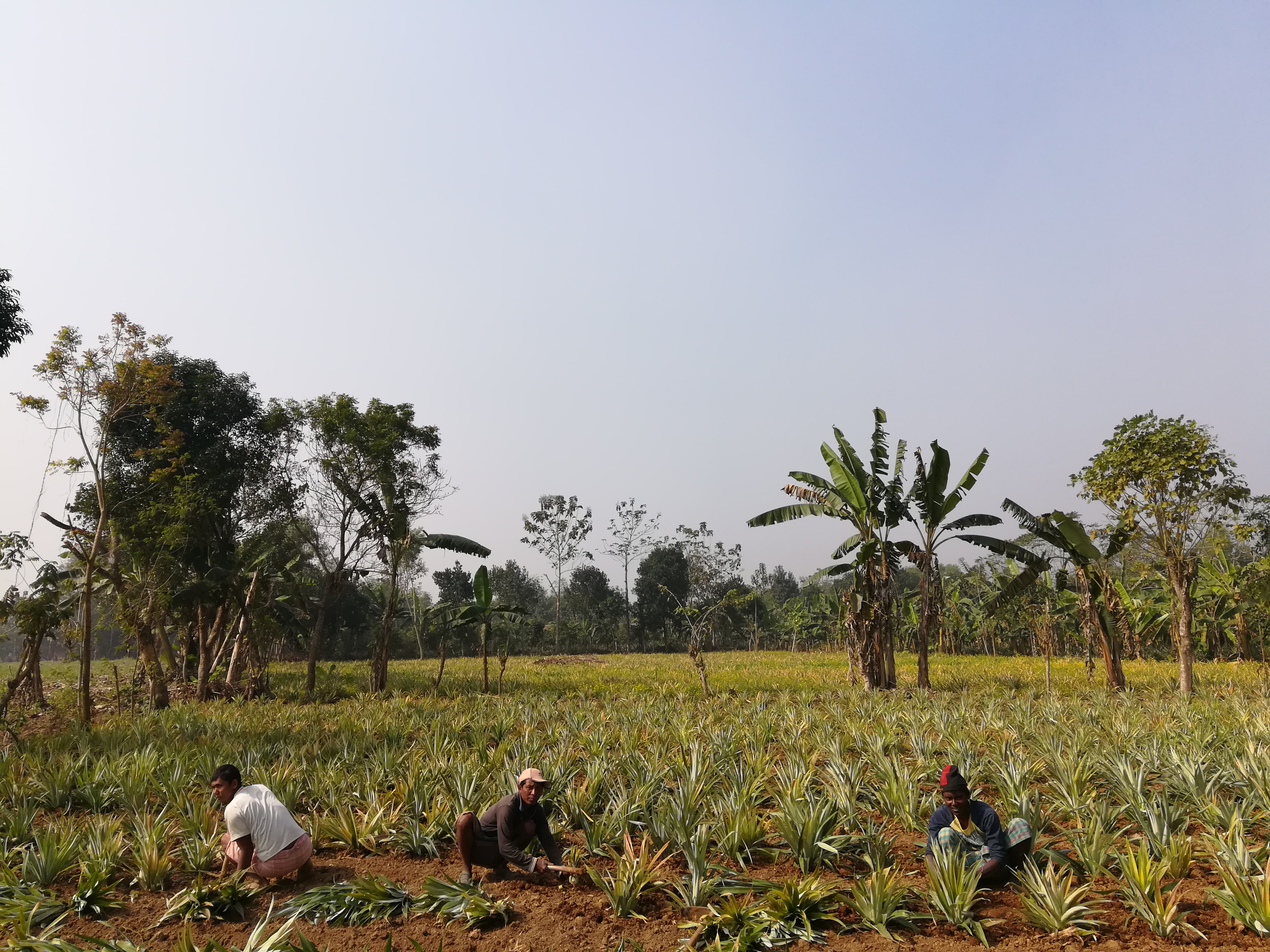 মধুপুর জাতীয় উদ্যান